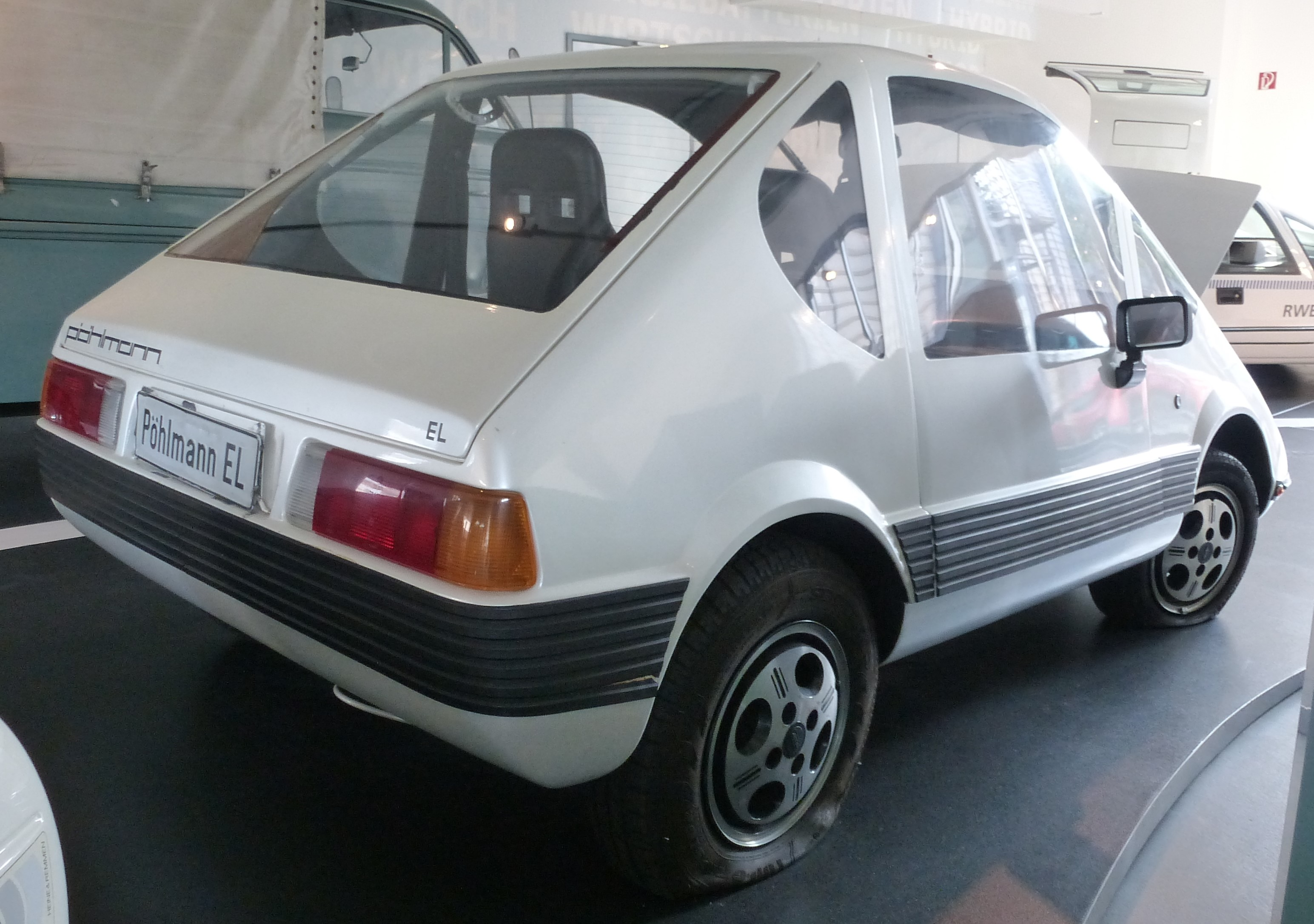 Pöhlmann